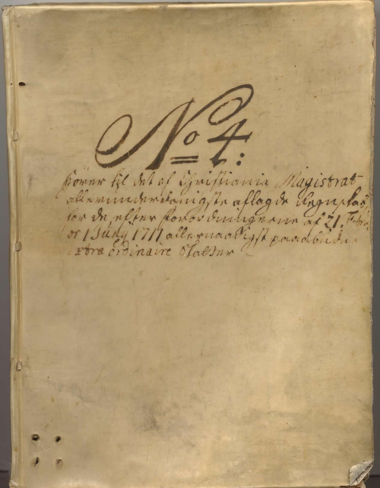 The Shoemaker's Protocoll in Christiania, 1711